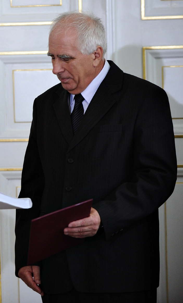 15.06.2010, Warszawa, Przekazanie Akt Katyńskich. Franciszek Gryciuk